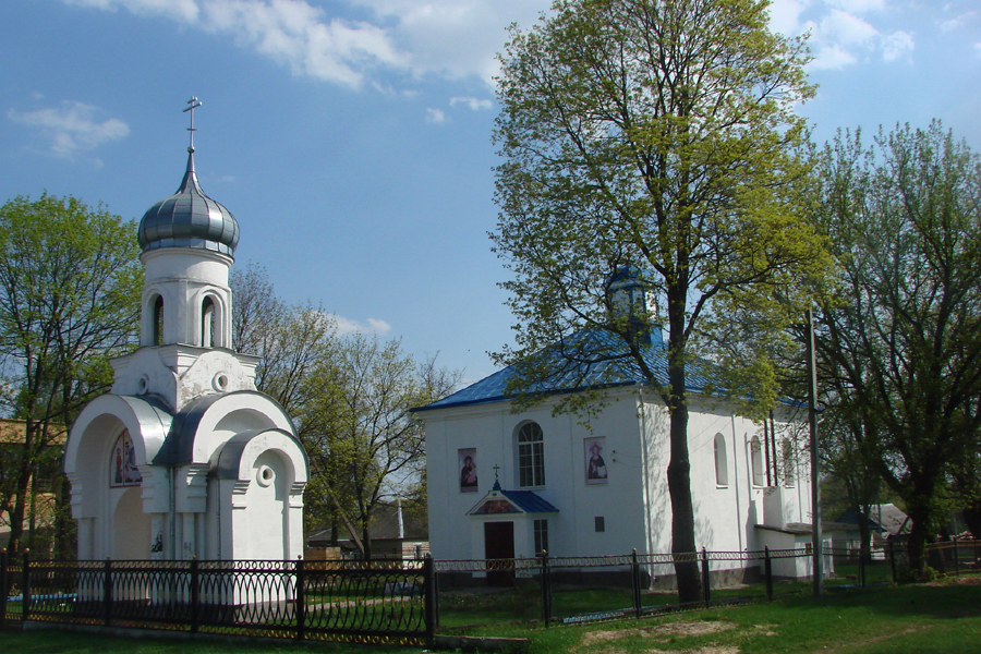 Фото 2012 года